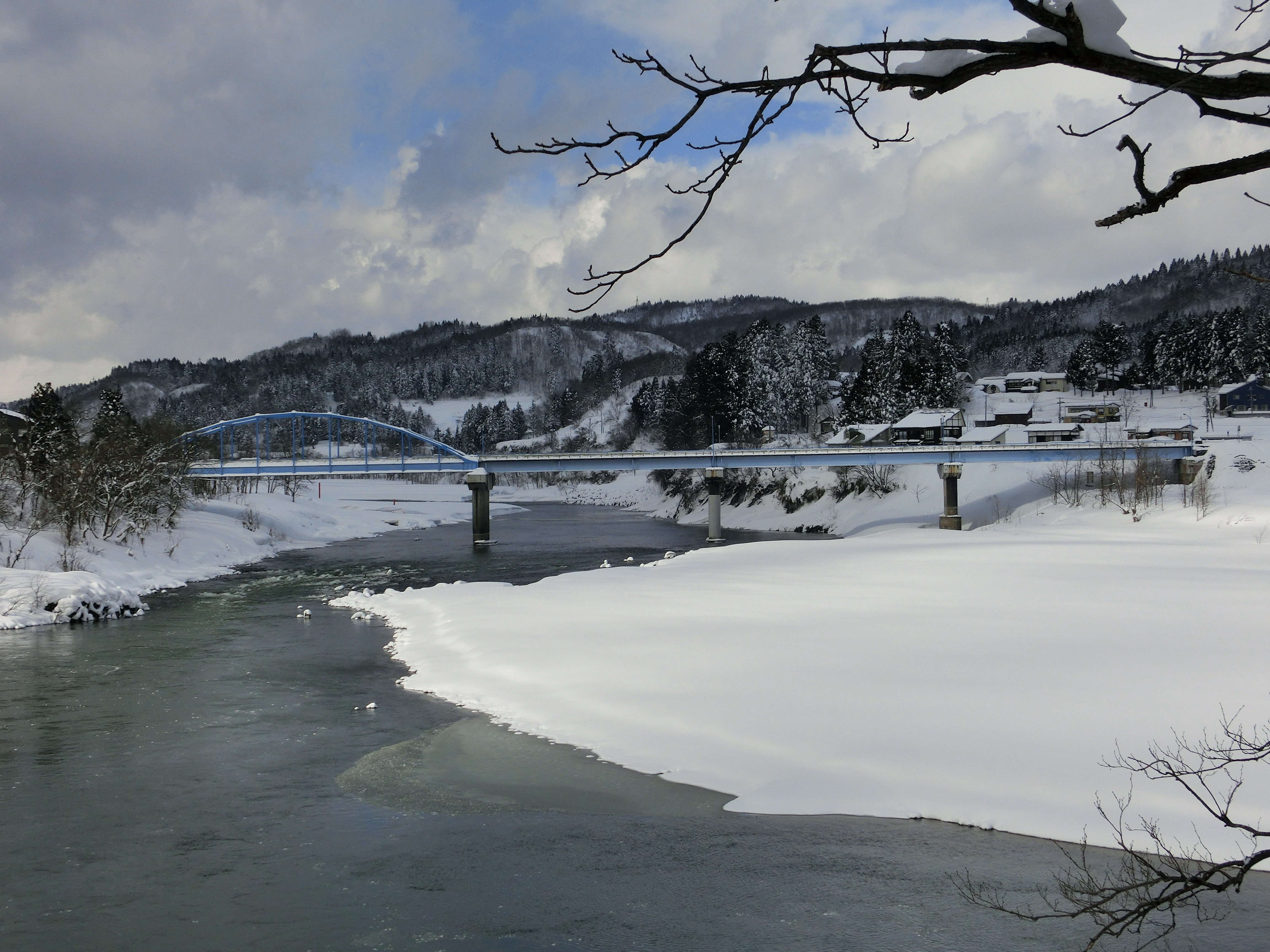 この画像は2018年1月26日投稿者によって、新潟県小千谷市岩沢桂（新潟県道58号小千谷大和線上）にて撮影された、信濃川に架かっている魚沼橋の写真。